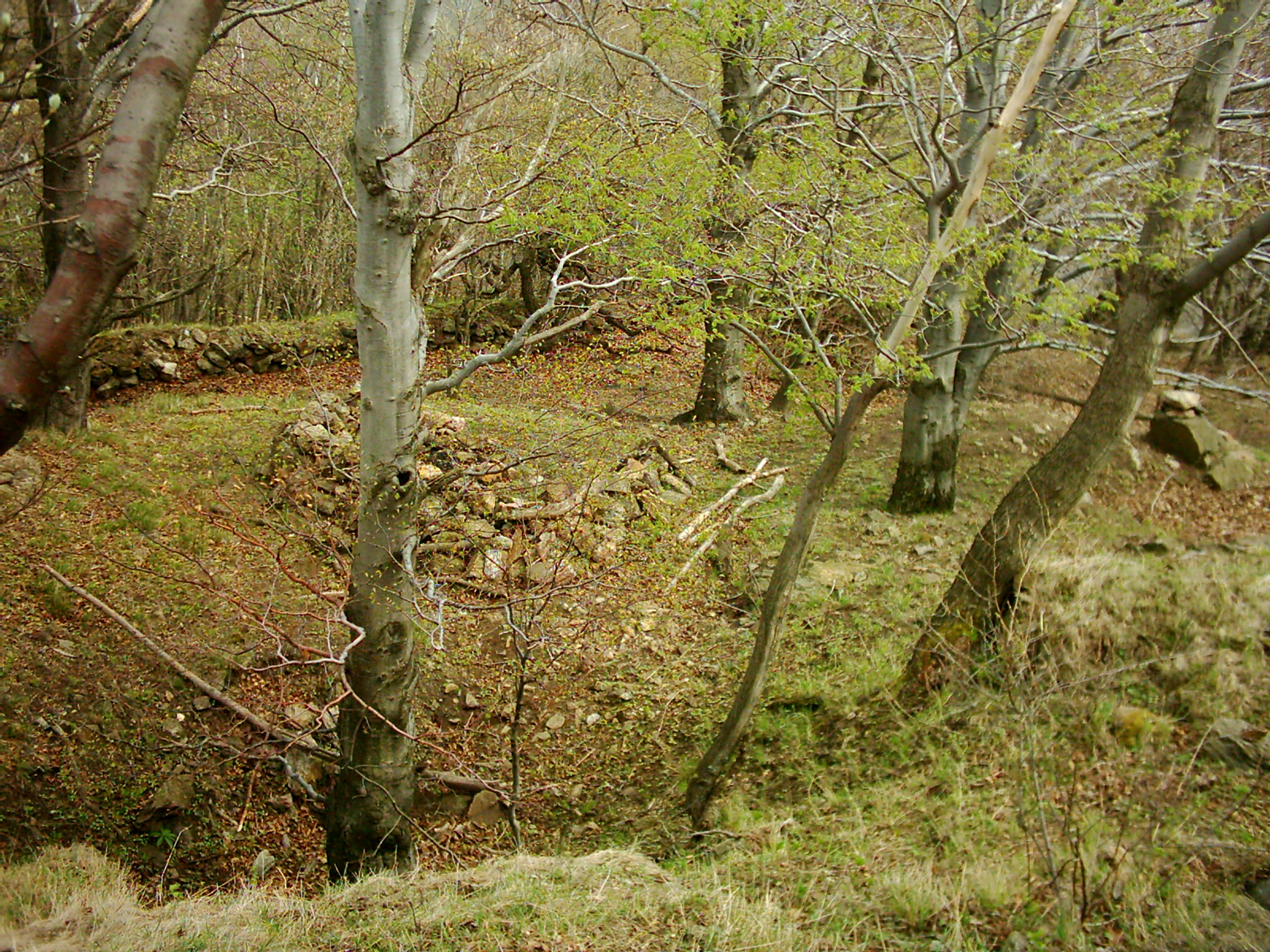 Starý Žeberk - plocha prvního nádvoří